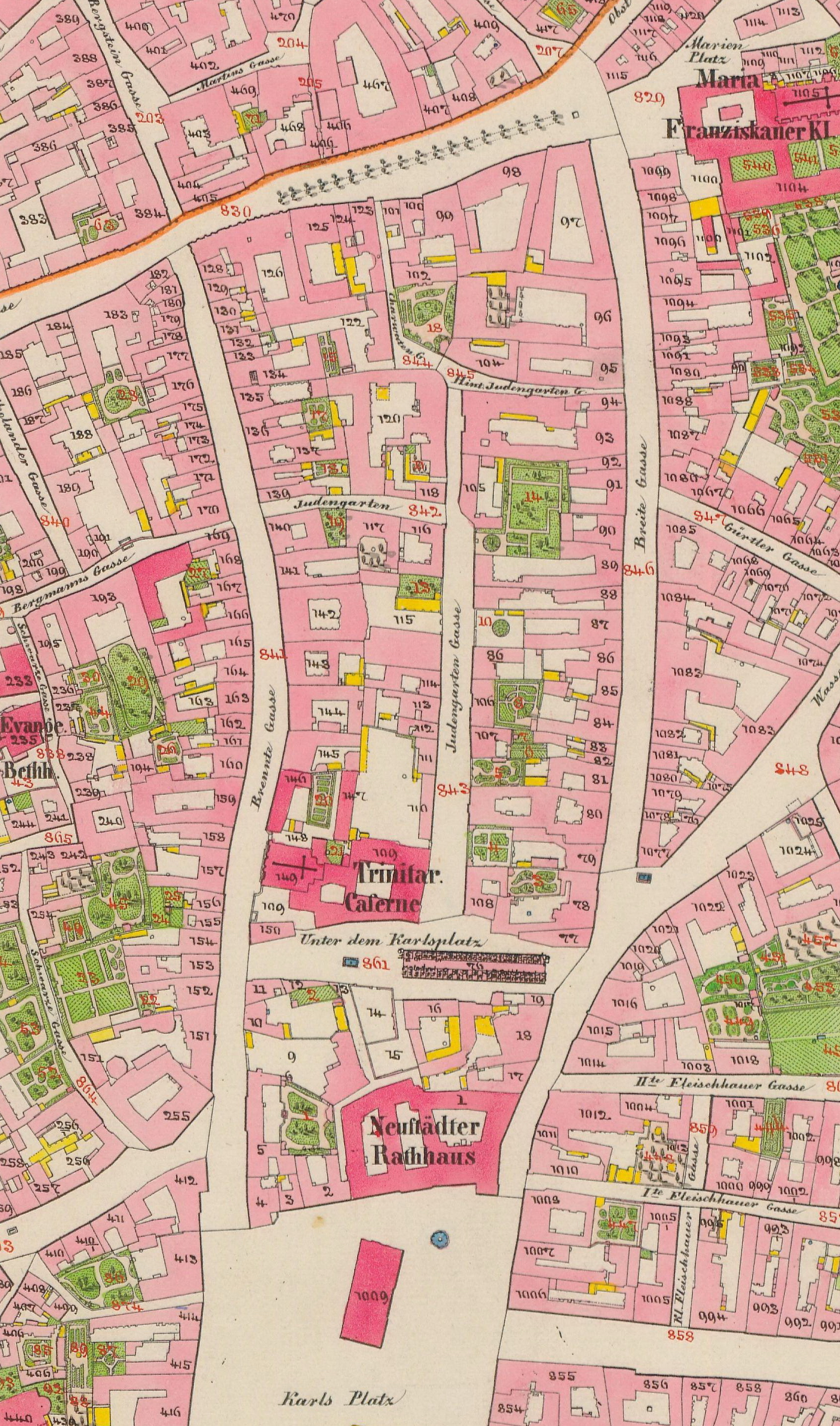 Praha 1, Staré Město, blok mezi ulicemi Lazarská, Spálená, Národní a Jungmannova. výřez mapy stabilního katastru (mapový list 6068-1-005)